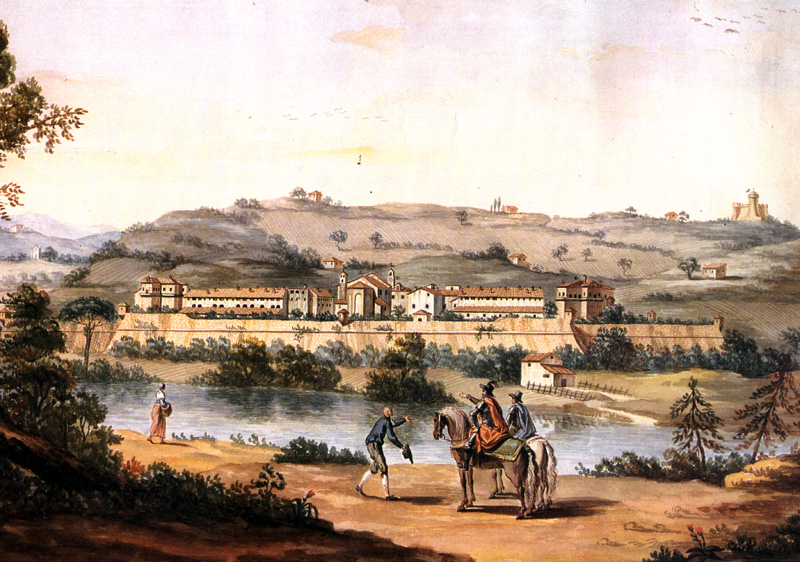 scansione da riproduzione stampa di antica veduta settecentesca della fortezza (collezione privata)